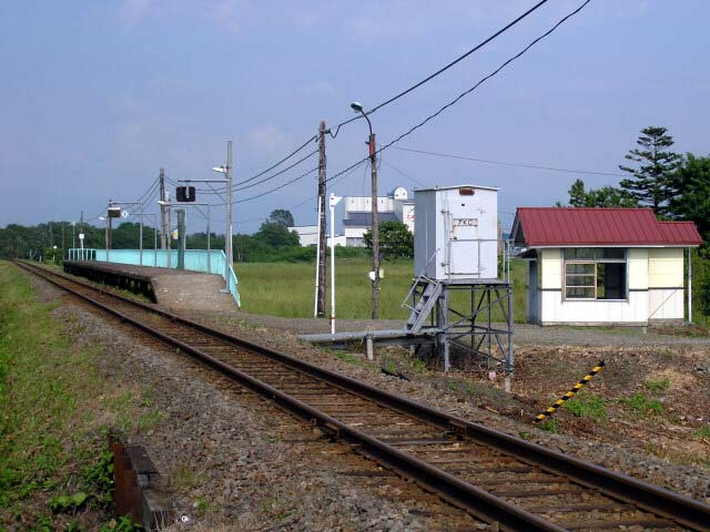 知来乙駅全景 撮影場所 知来乙駅そばの踏切。 撮影者によるGFDLリリース